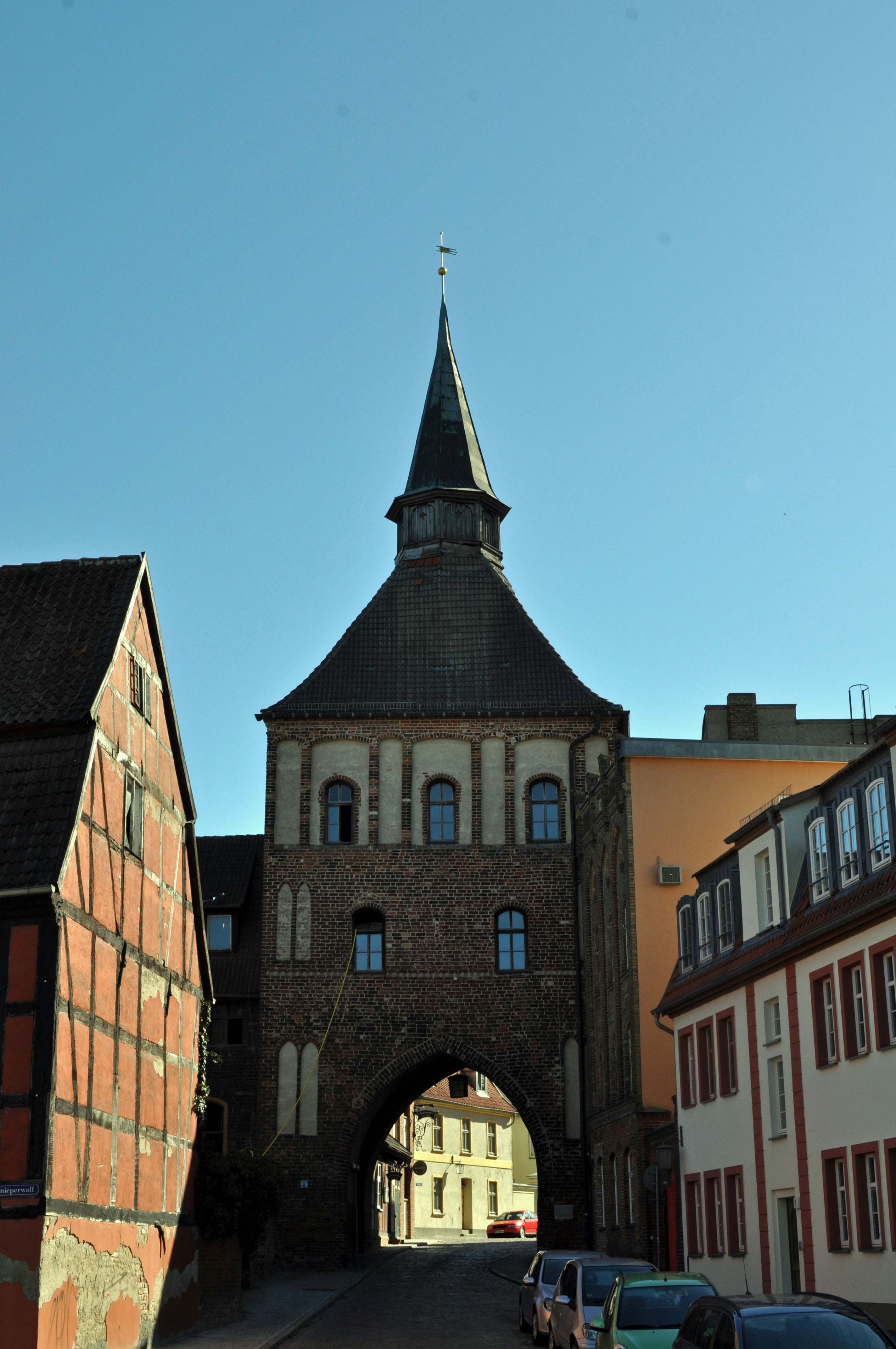 Gebäude bzw. Gebäudedetail in Stralsund. Straße und Hausnummer siehe Dateiname.